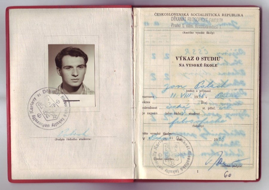 Výkaz o studiu na Vysoké škole. Průkaz patřil Janu Palachovi.